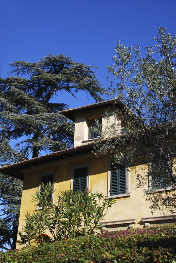 Fondazione Spadolini Nuova Antologia, Via Pian dei Giullari 139, Florence, Italy. Fundation seat: Villa Spadolini at Montici (detail)